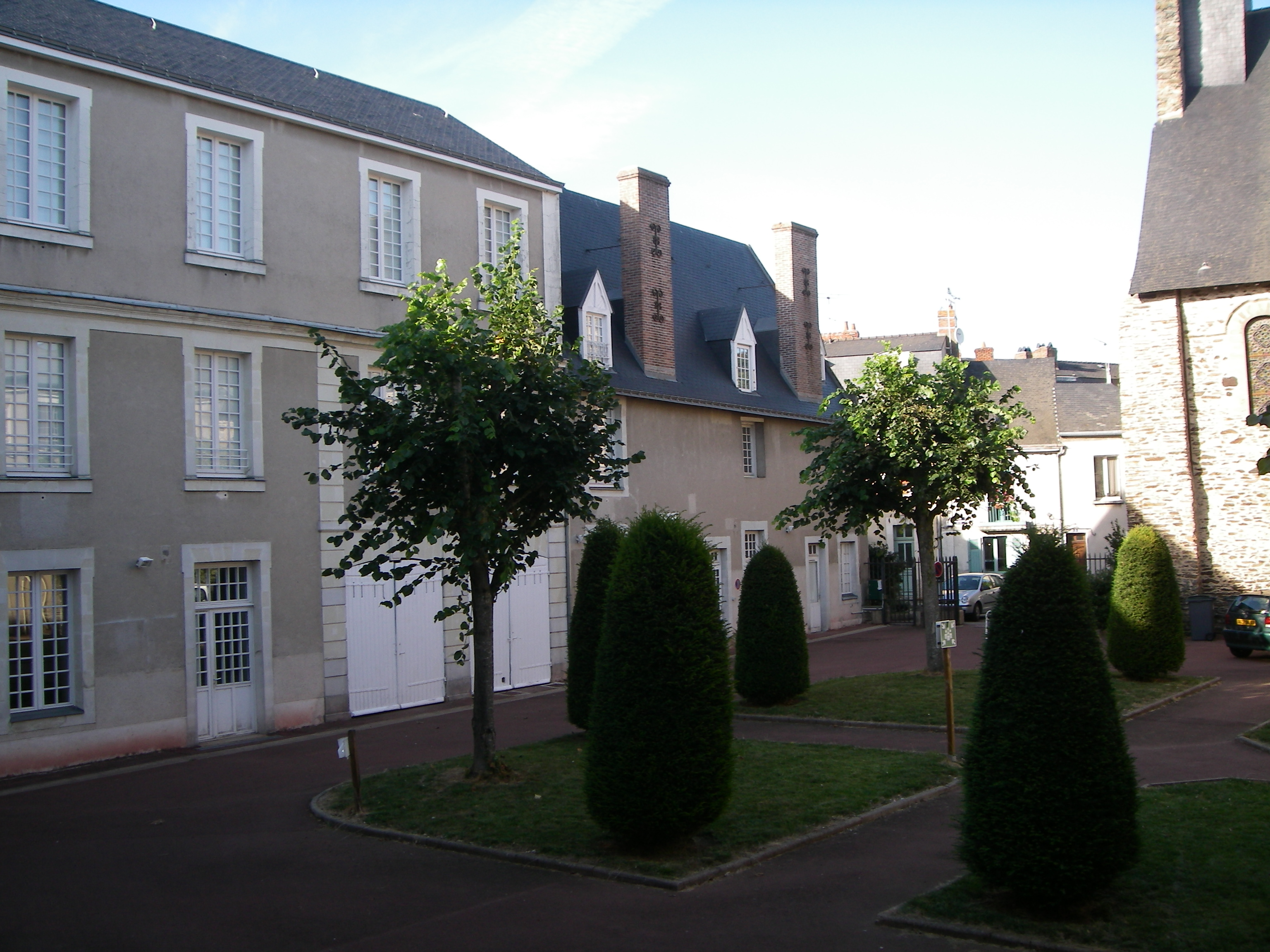 lycée Victor-Hugo cour d'honneur